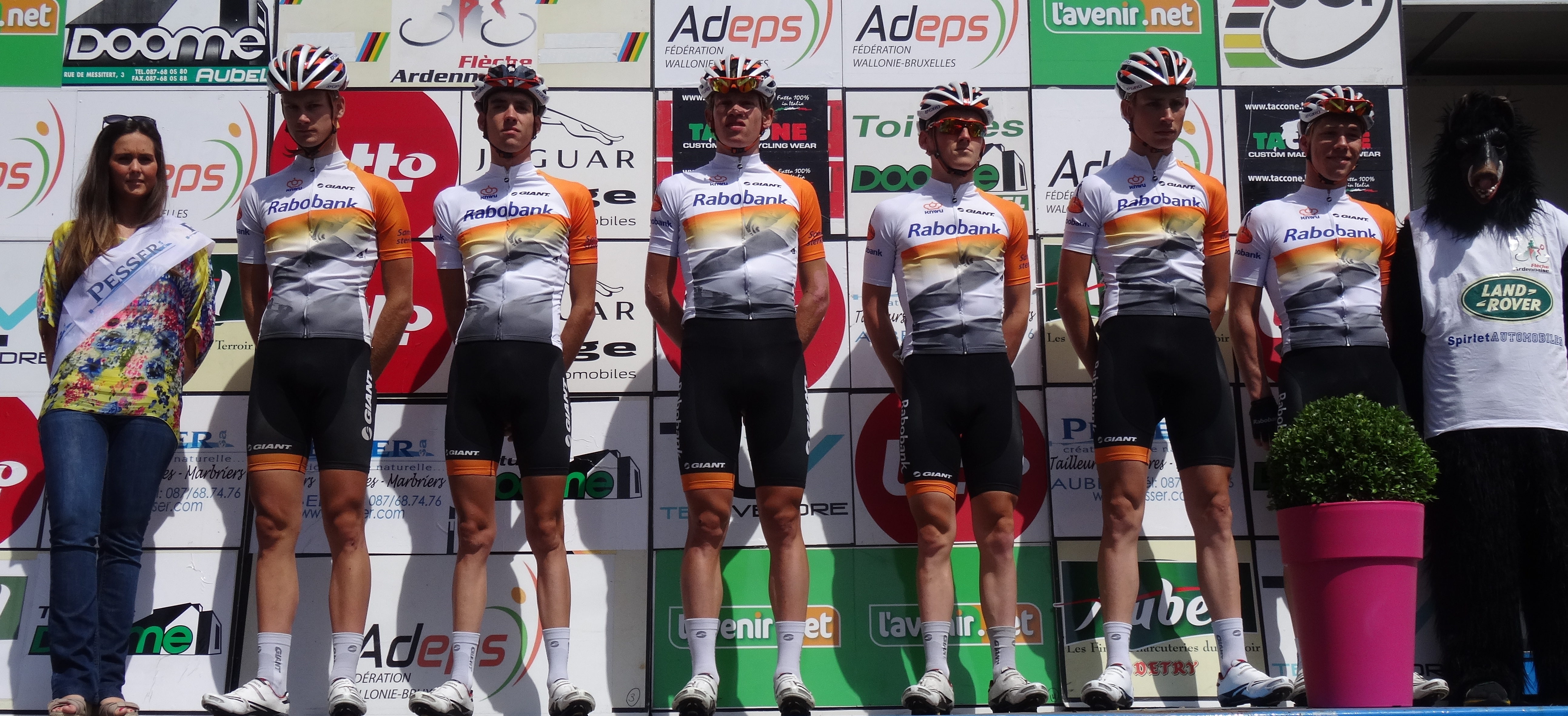 Reportage photographique réalisé le dimanche 22 juin à l'occasion du départ et de l'arrivée de la Flèche ardennaise 2014 à Herve, Belgique.